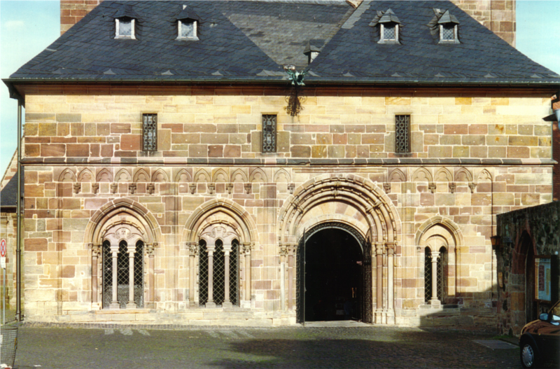 Fritzlar Dom St. Peter, Westvorhalle (ehem. Elisabethkapelle)